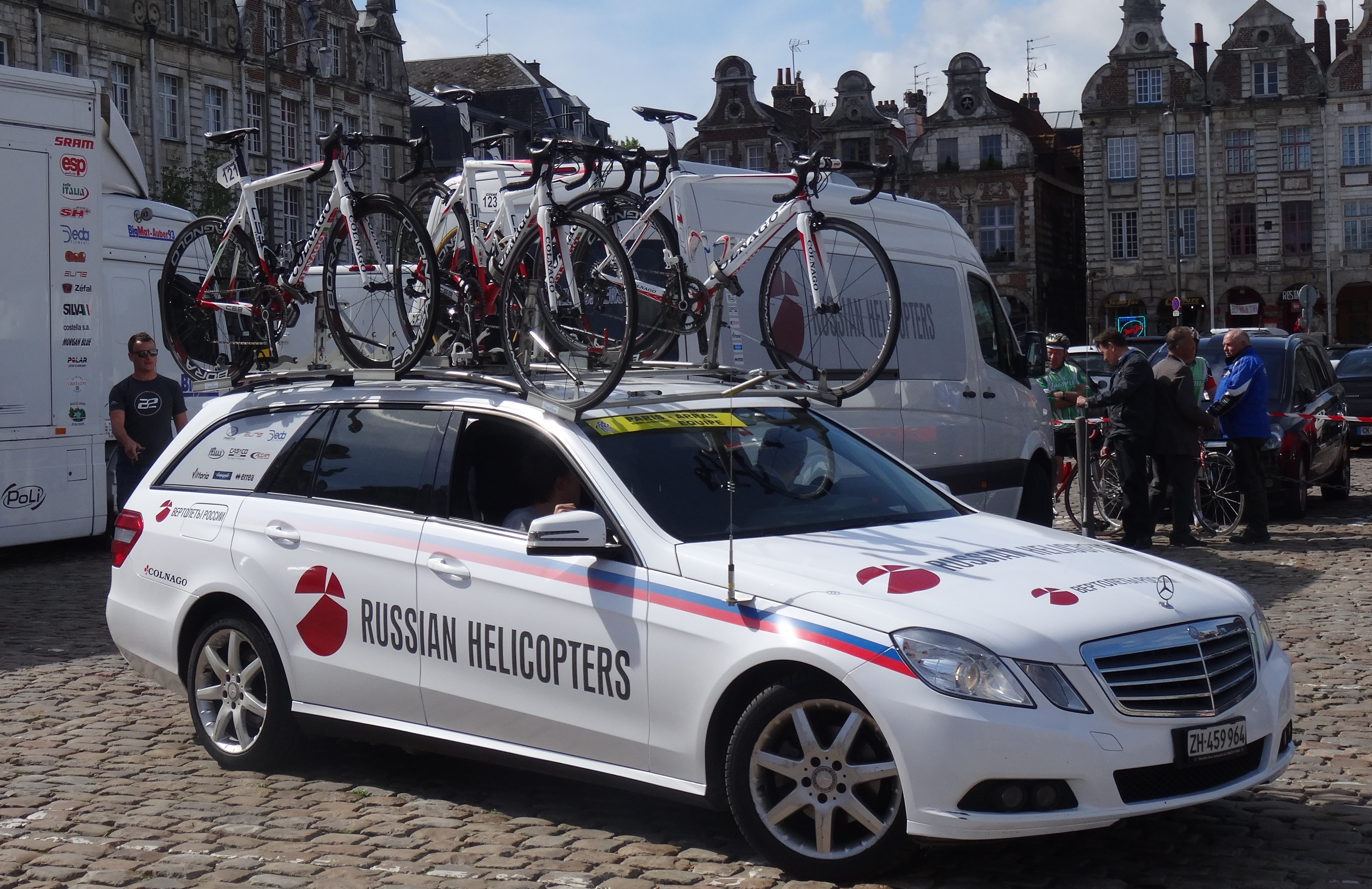 Reportage photographique réalisé le dimanche 25 mai 2014 à l'occasion du départ et de l'arrivée de la troisième étape du Paris-Arras Tour 2014 à Arras, Pas-de-Calais, Nord-Pas-de-Calais, France. Depicted team: Russian Helicopters